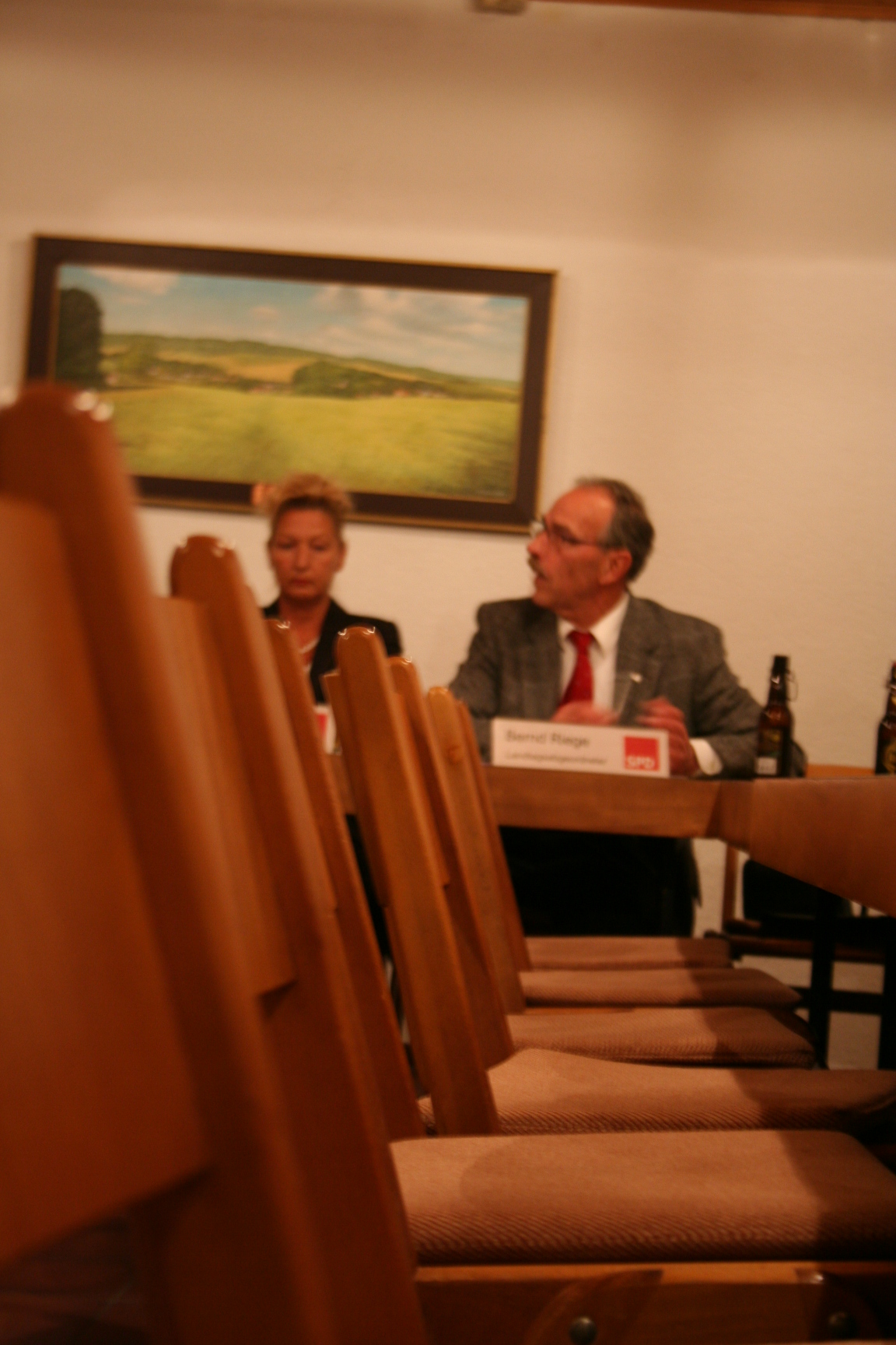 Bernd Riege, hessischer Landtagsabgeordneter (SPD)